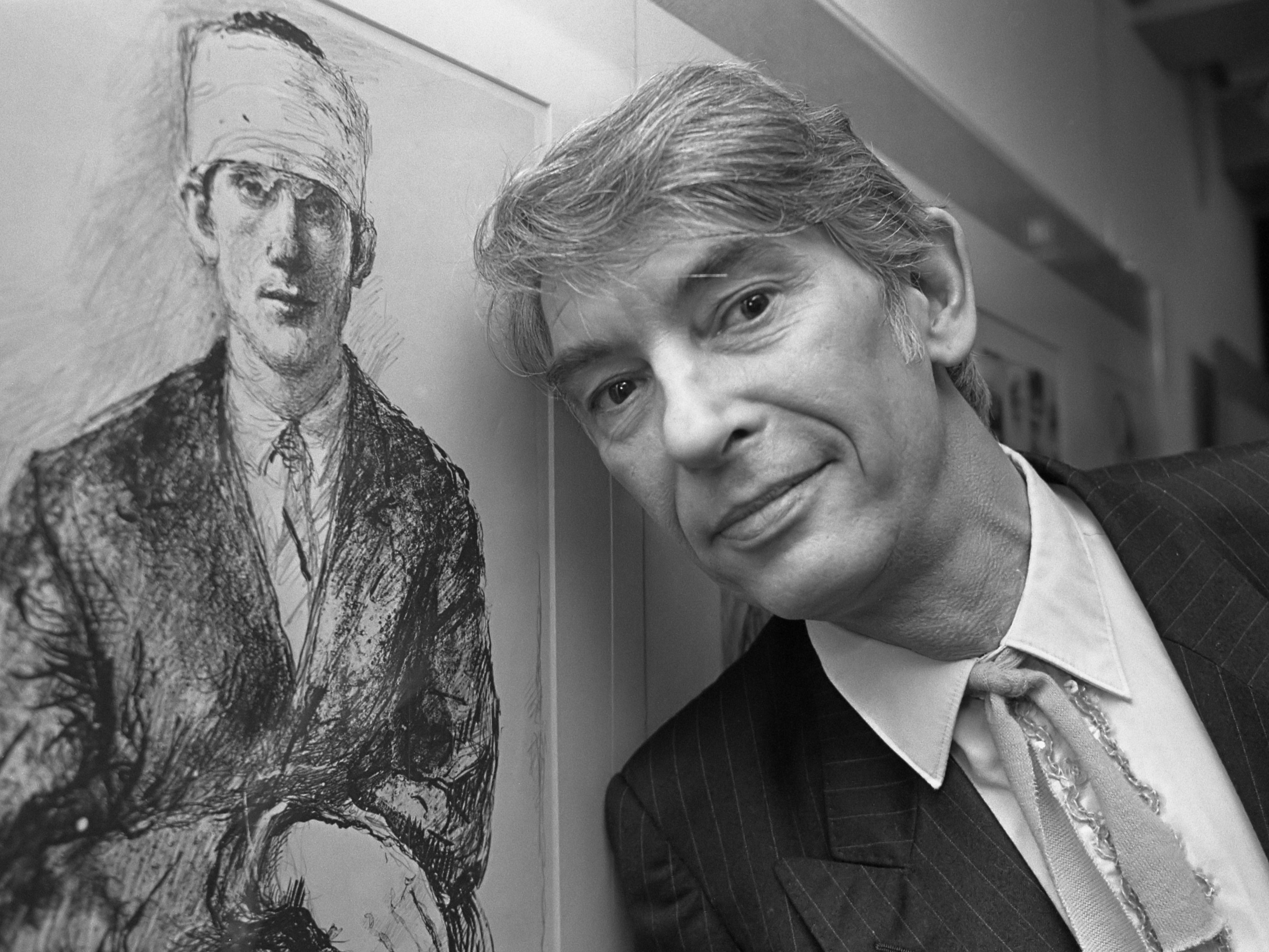 Tentoonstelling Aat Veldhoen in AHM; Aat Veldhoen bij portret van Bart Hughes 13 januari 1987